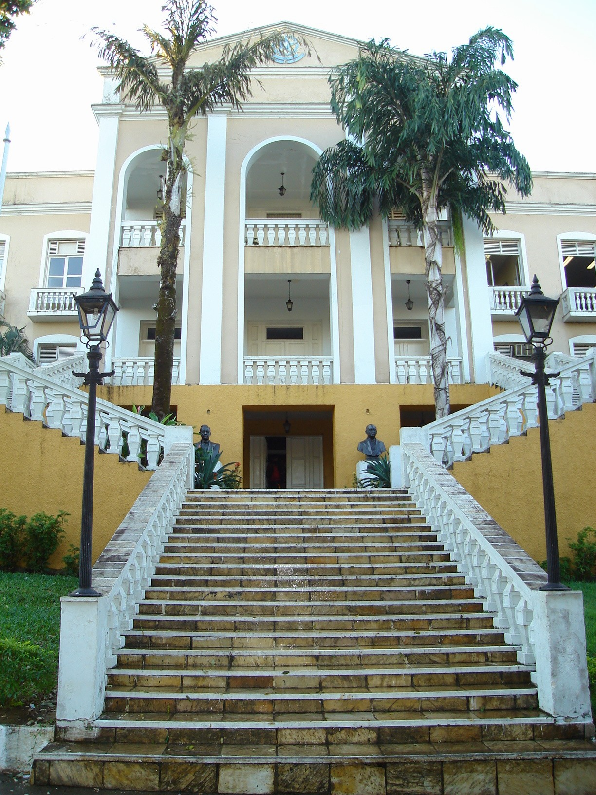 Getúlio Vargas Palace, Porto Velho, Rondônia, Brazil